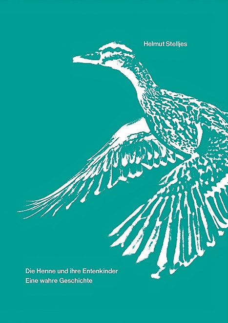 Buchcover des Buches Die Henne und ihre Entenkinder von dem deutschen Autoren und Fotografen Helmut Stelljes (* 1933 in Bremen). Das Buch erschien 2013 im Druckerpresse-Verlag, Lilienthal, und enthält Illustrationen des Autors.